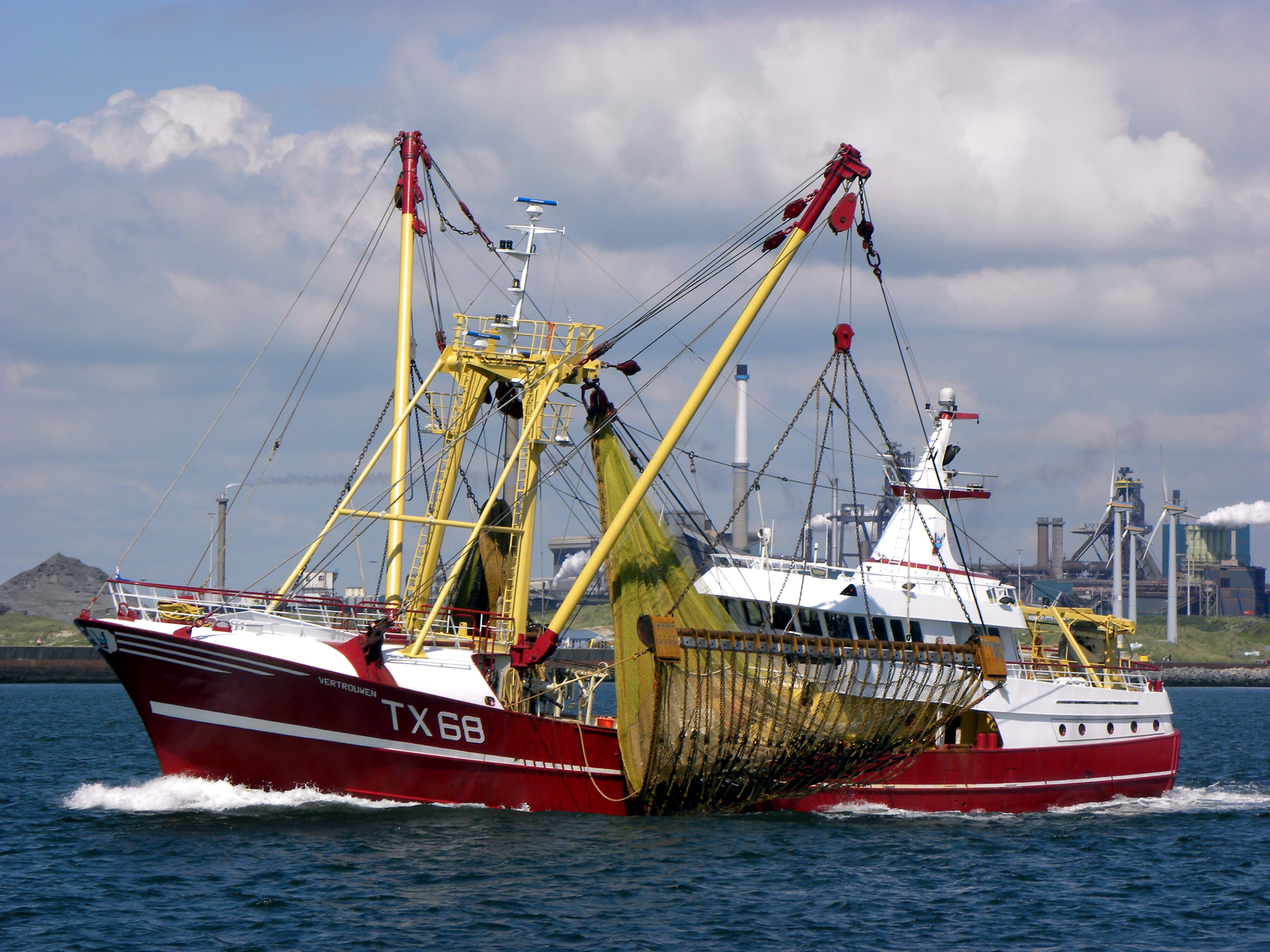 TX 68 Vertrouwen - Texel